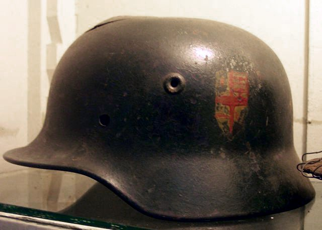 M40, german WWII Stahlhelm (steel helmet)